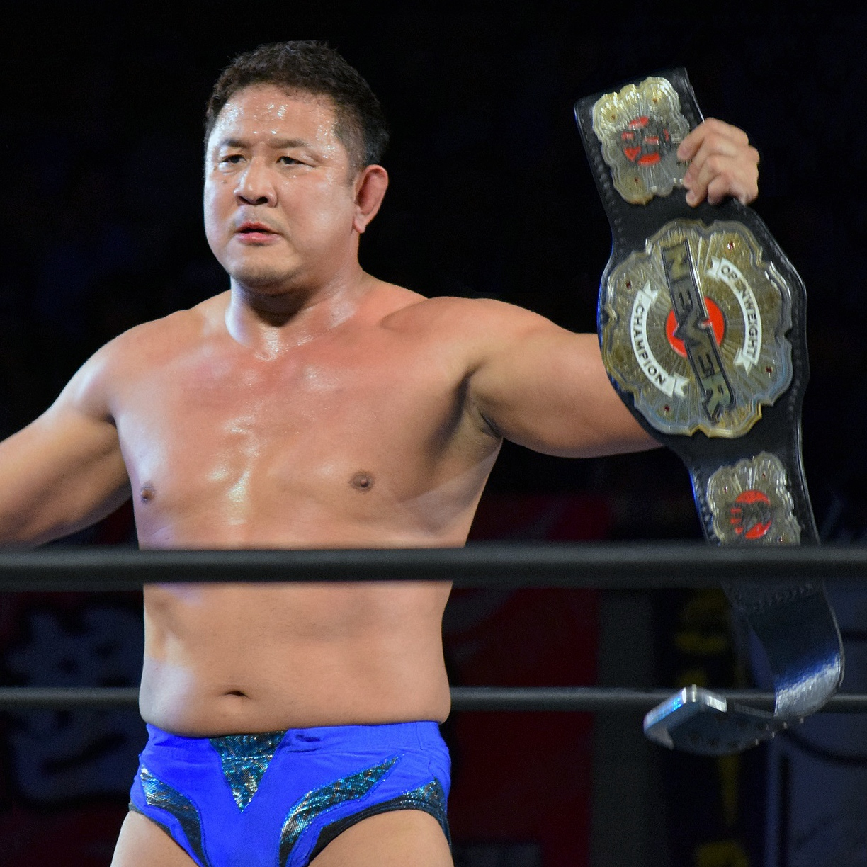 2016年5月29日 大阪市中央体育館・サブアリーナ 「BEST OF THE SUPER Jr.XXIII」 永田裕志